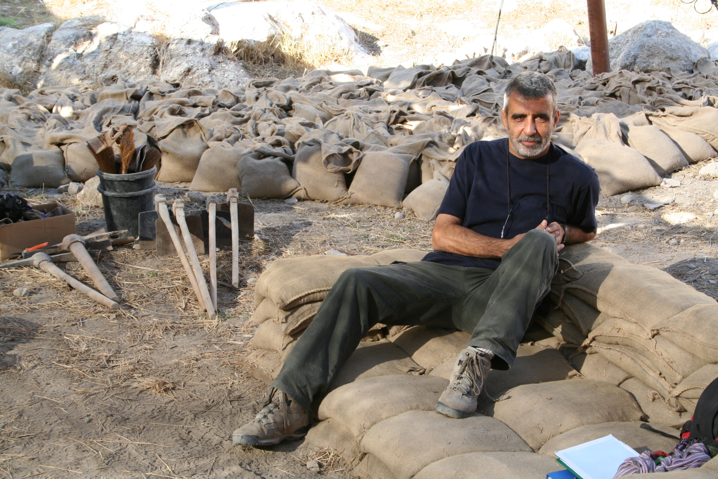 Israel Finkelstein (ישראל פינקלשטיין) is an Israeli archaeologist